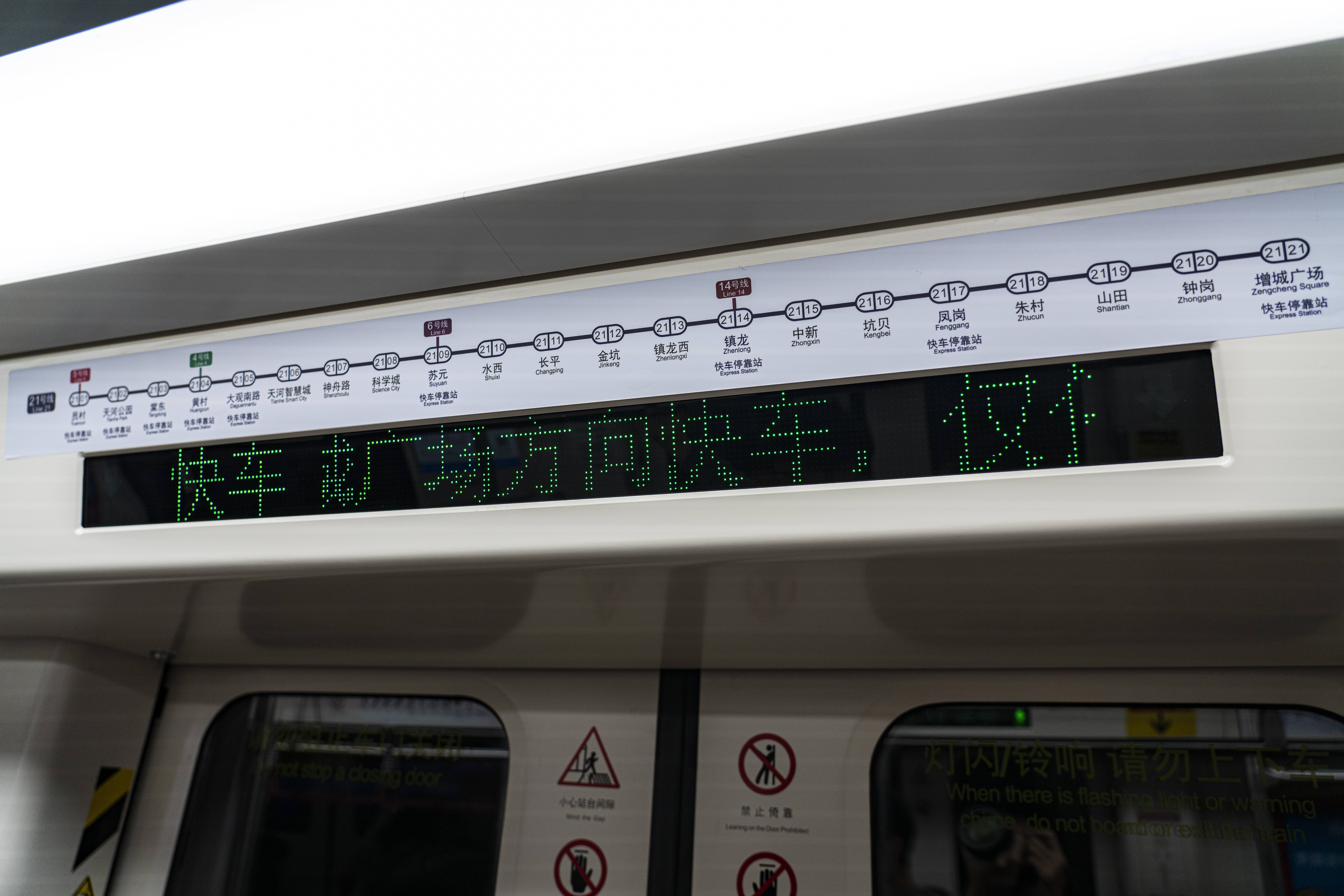 21号线快车内LED走字屏使用绿色的文字，并有“快车”字样